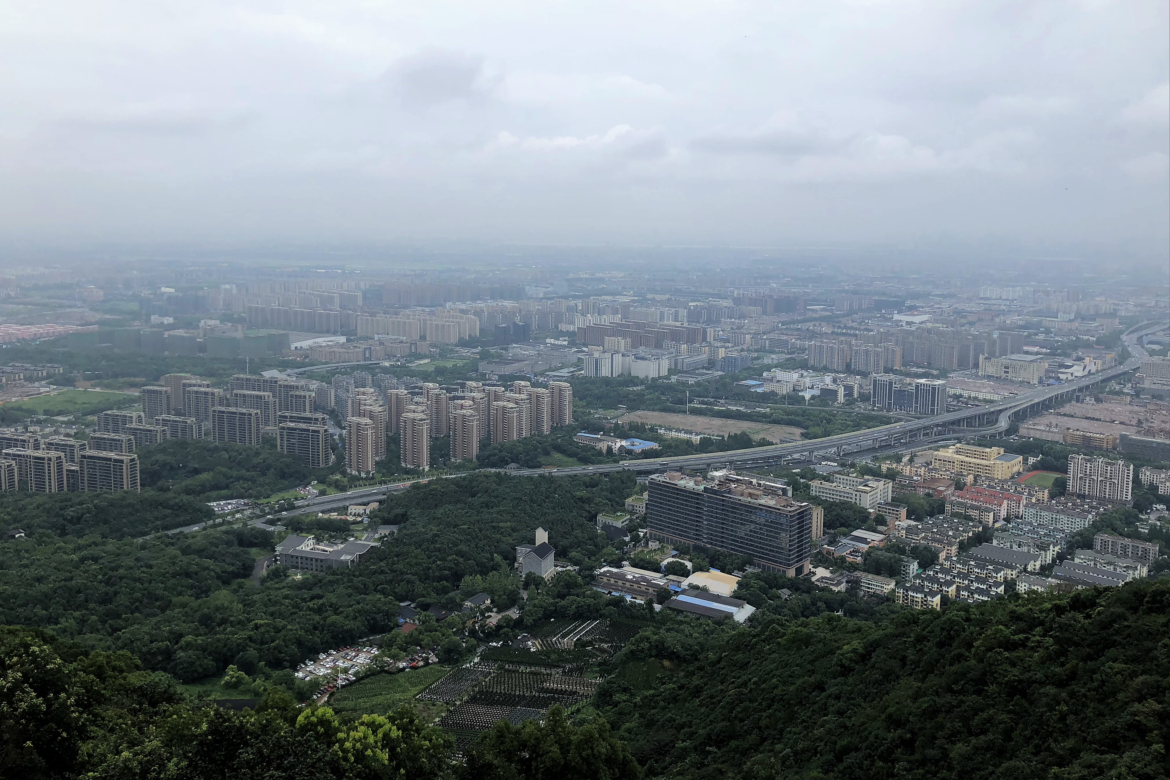 中文（中国大陆）: 石桥路、秋石快速路 望宸阁眺望